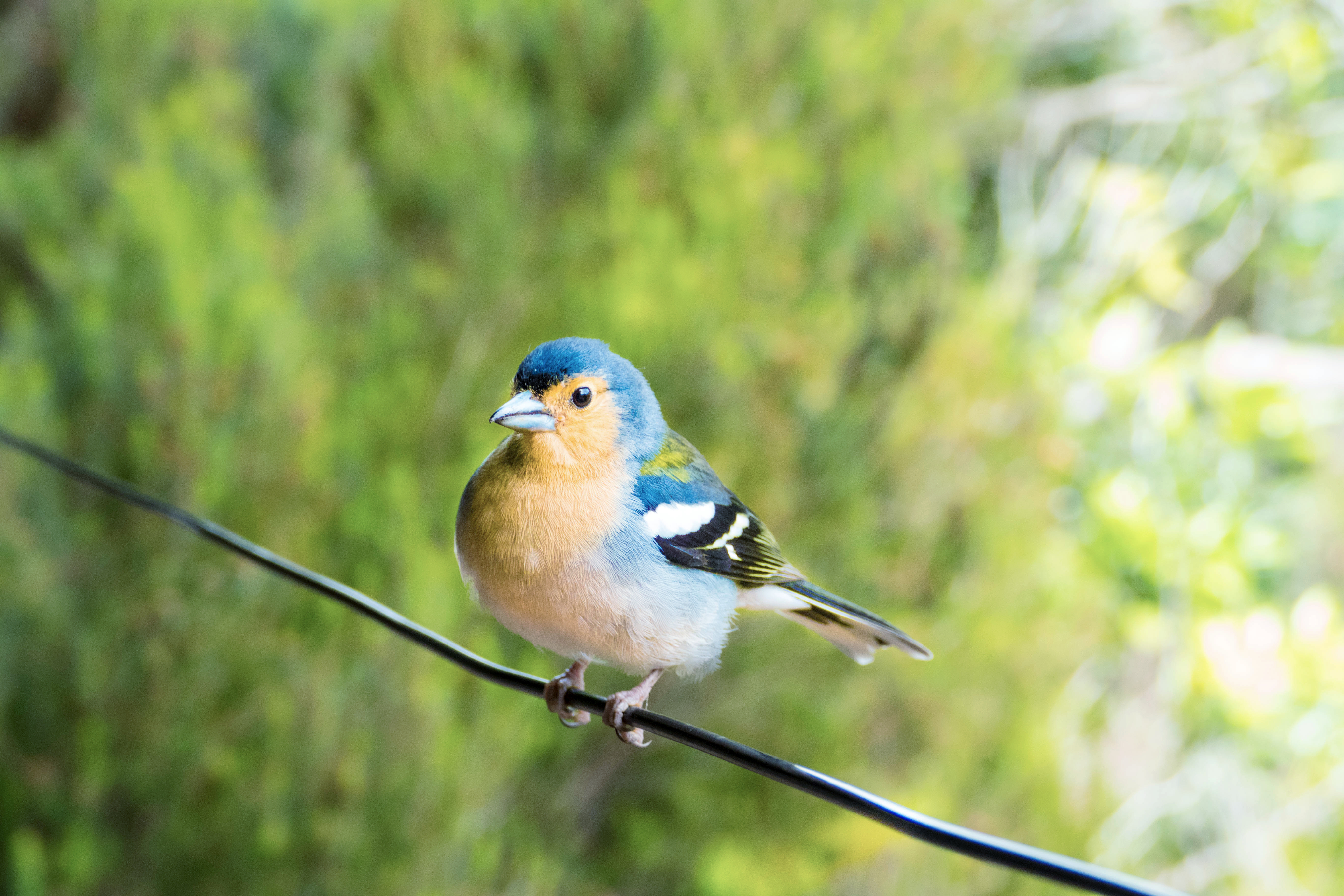 Maderia Buchfinken zeigen sich teils sehr zutraulich und lassen es zu, sich auf wenige Zentimeter anzunähern. Daher stellen Maderia Buchfinken dankbare Motive für Fotografen auf dem vulkanischen Atoll dar, die sich insbesondere in höheren Lagen aufhalten.